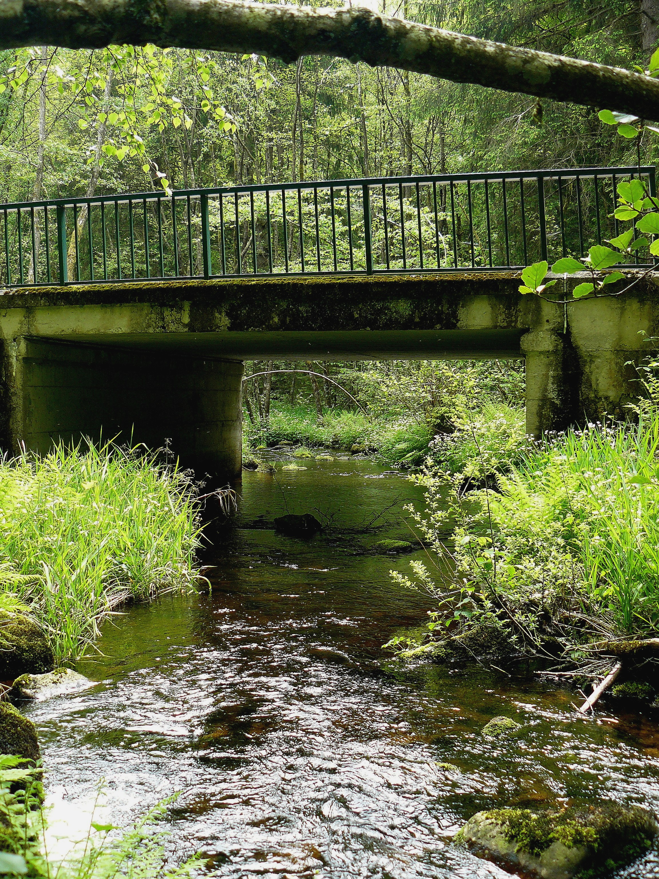 Pont de la route D179 sur la rivière Canche, dans le Morvan (Saône-et-Loire, France)